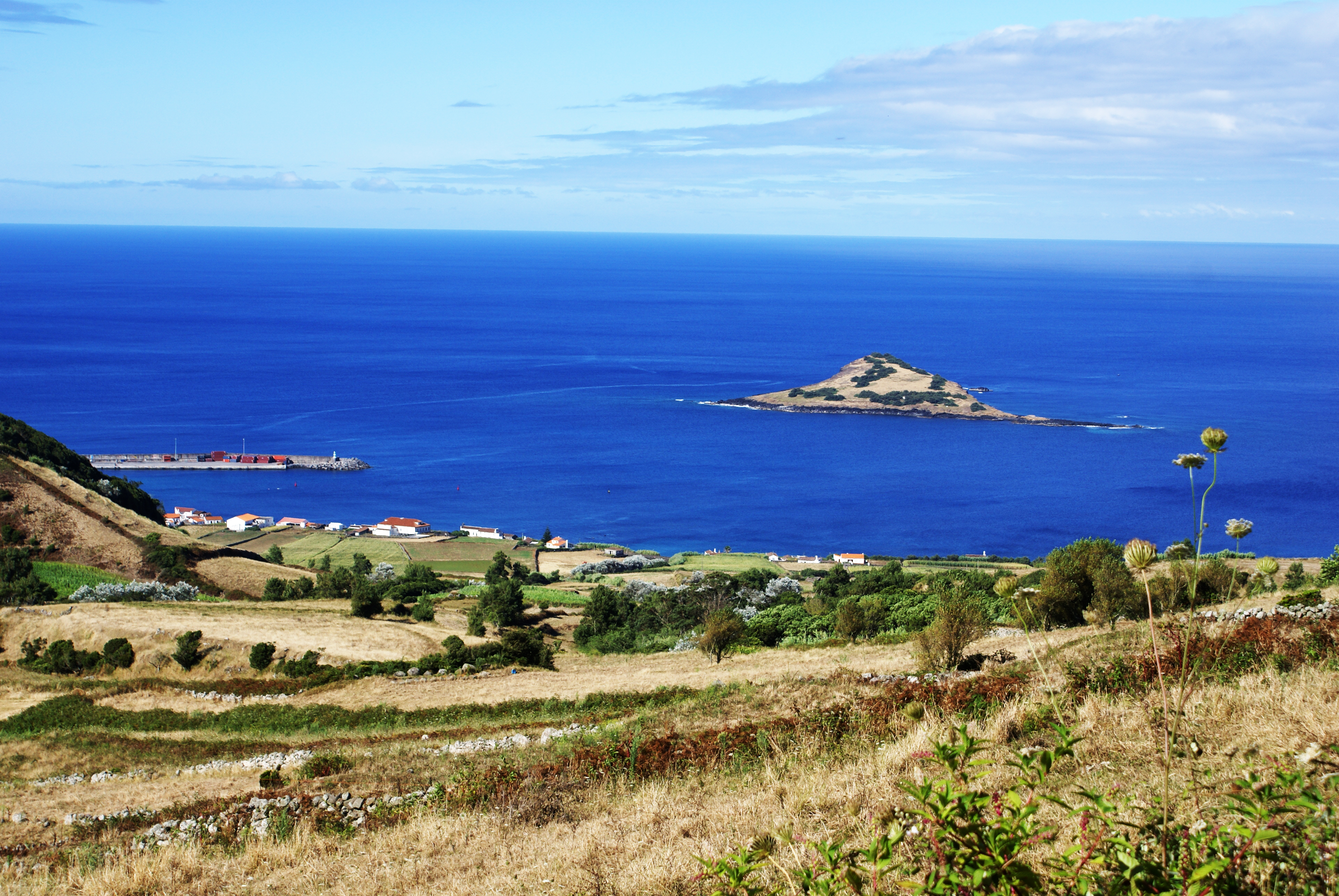 Ilhéu da Praia da Graciosa, ilha Graciosa, Açores, Portugal